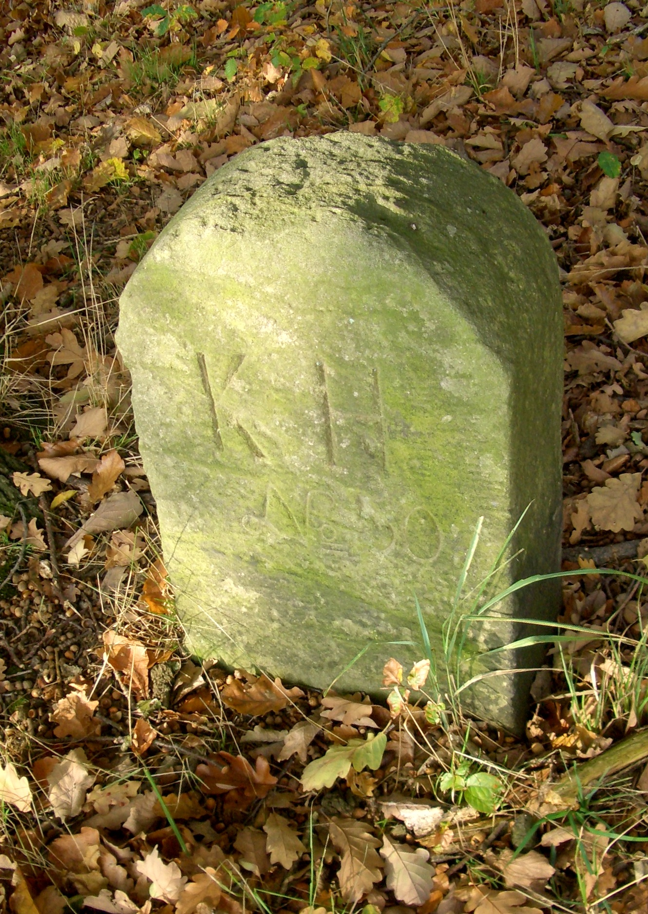 Grenzstein "KH No. 50" (Königreich Hannover) und "HB" (Herzogtum Braunschweig) im Oderwald bei Ohrum.